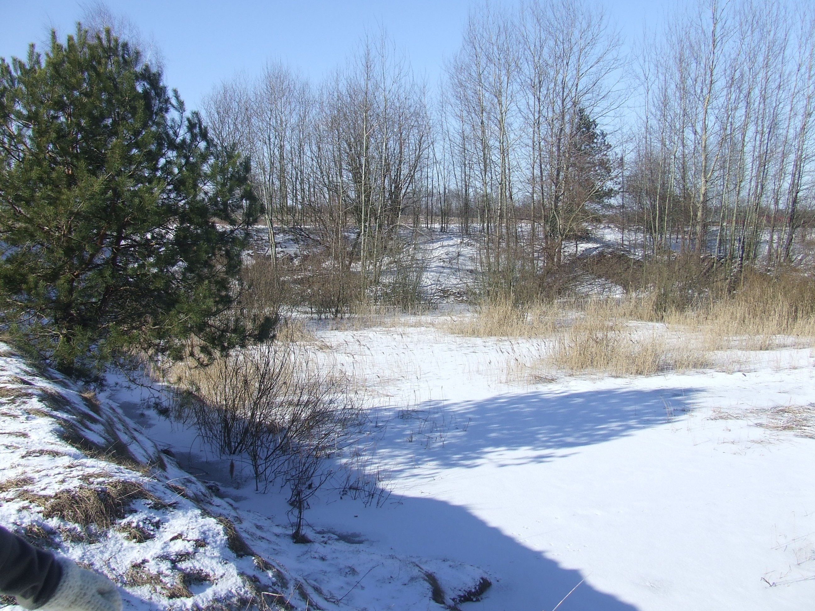 Parszczyny w Wypnisze - wyrobisko po kopalni piachu w miejscu dawnego cmentarza ofiar epidemii cholery.